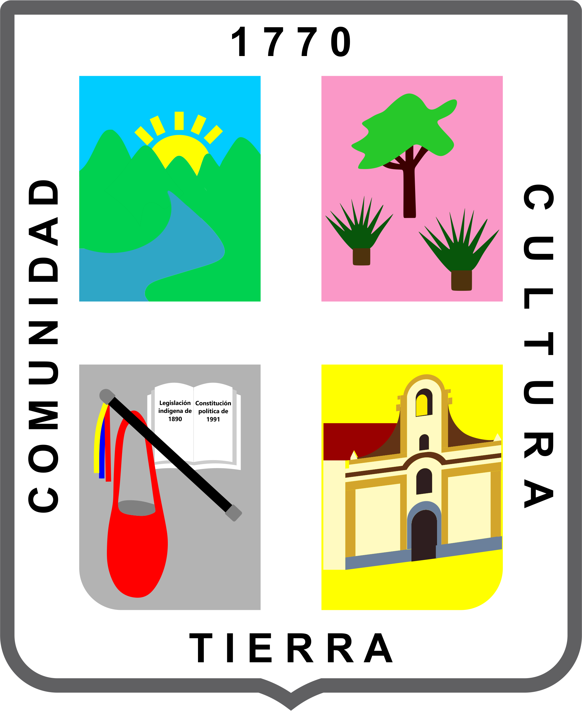 Escudo del Municipio de Jambaló (Cauca - Colombia)